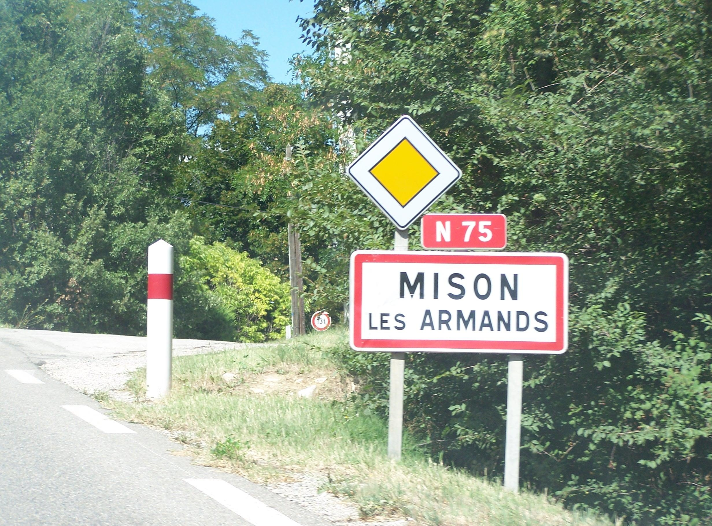 Panneau annonçant l'entrée à Mison les Armands, le 20/08/06. Photo personnelle.